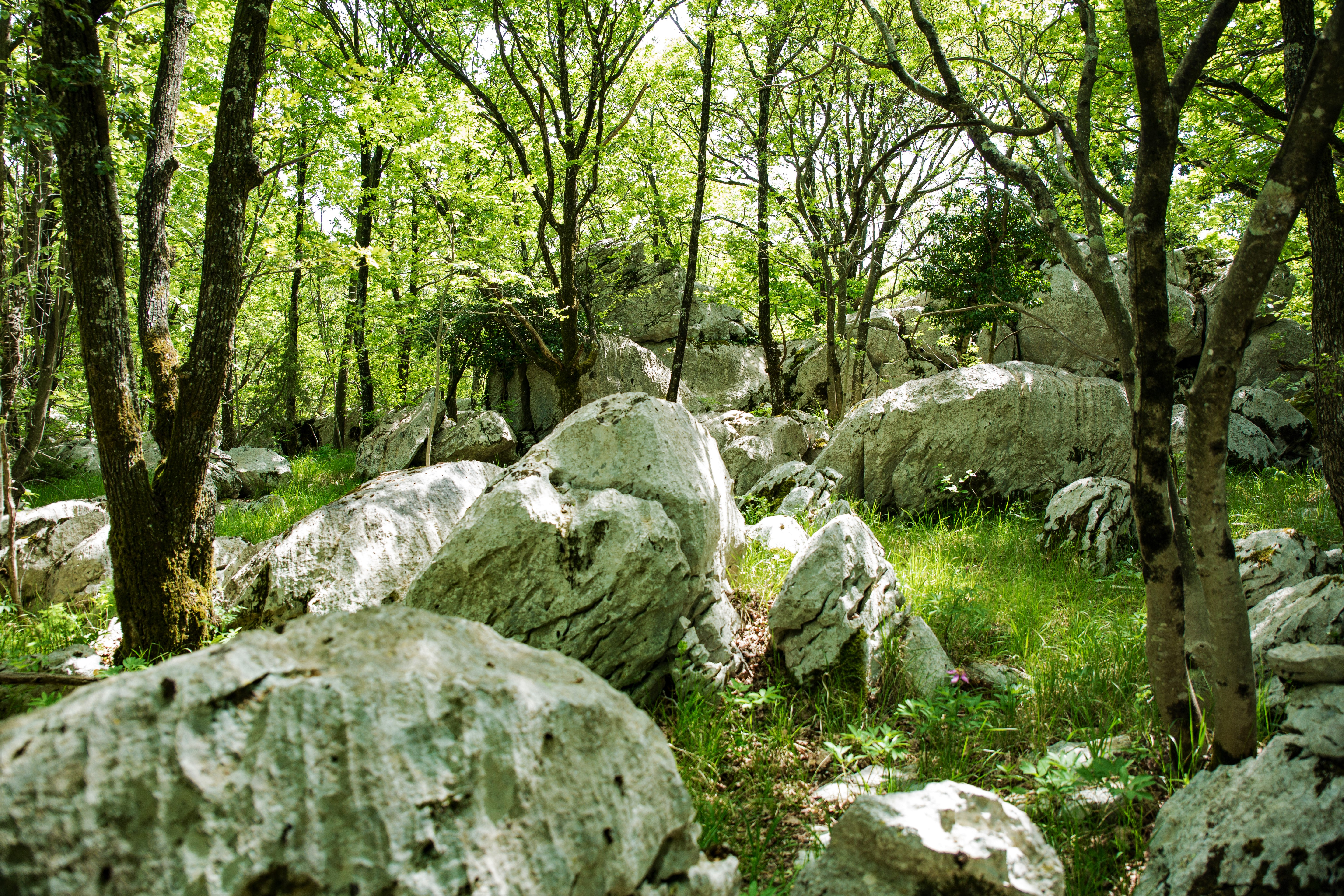 Živi muzej krasa